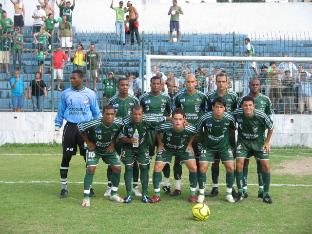 Equipe profissional do Floresta Atlético Clube, em 2007.